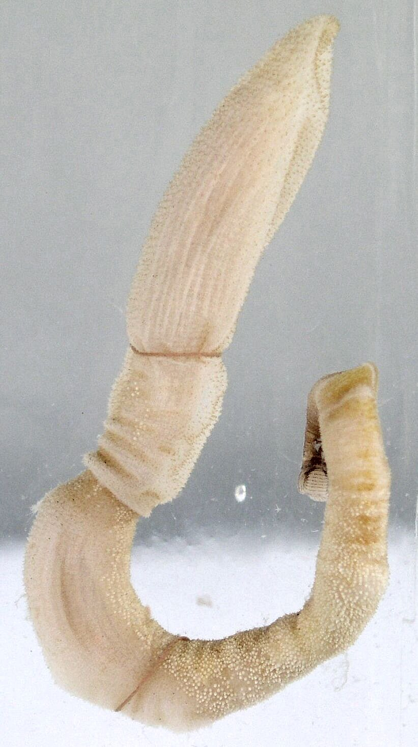 Eichelwurm, Exemplar aus der Sammlung des Institutes für Zoologie, FU Berlin. GNU FDL